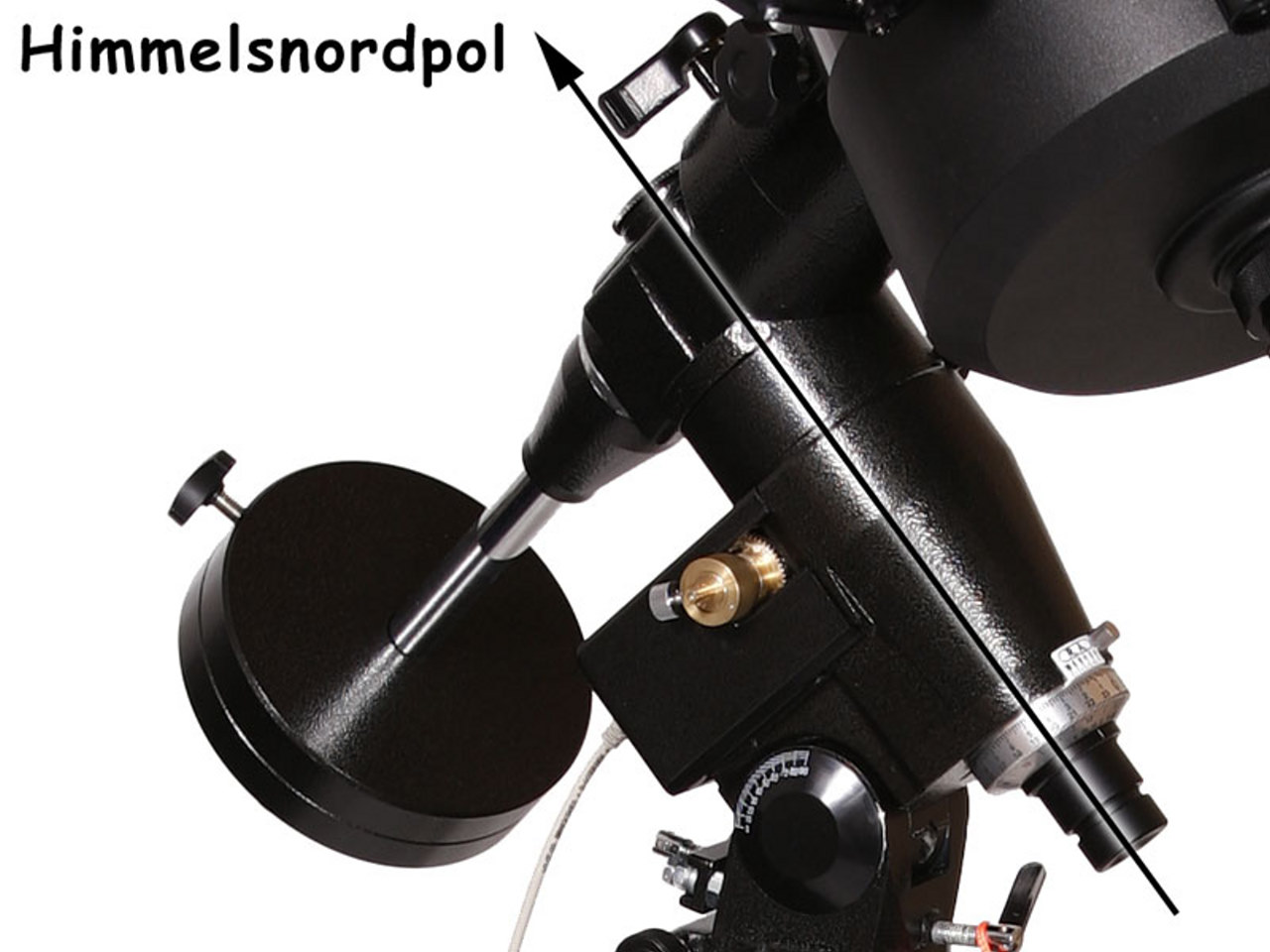 Polar Star Finder